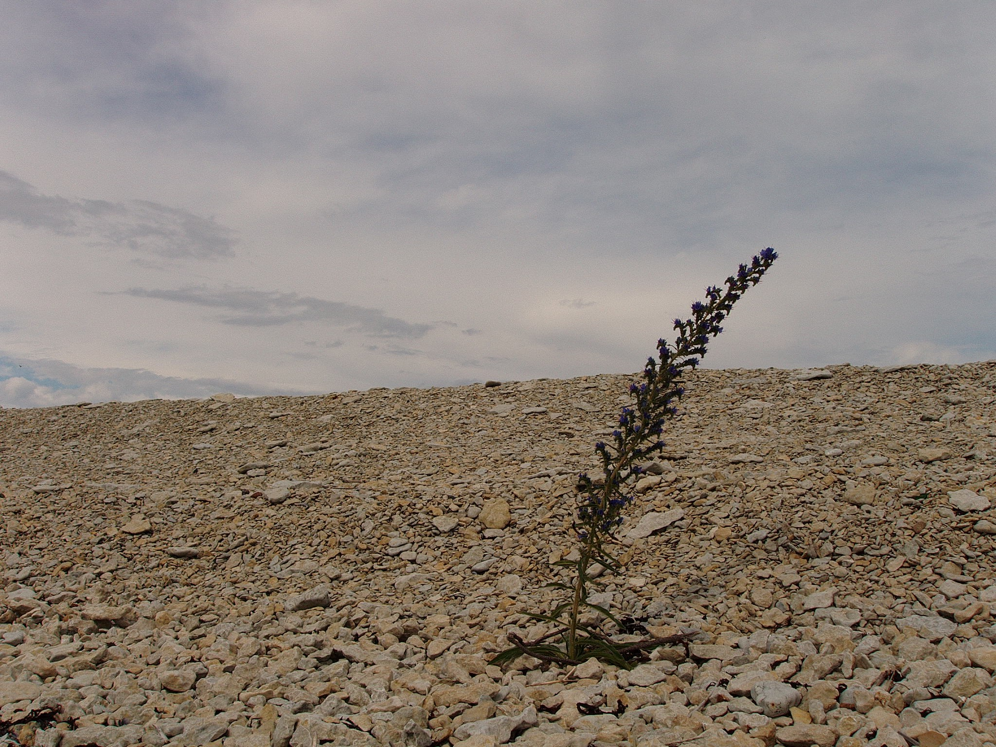 Echium vulgare in Osmussaar, Estonia.